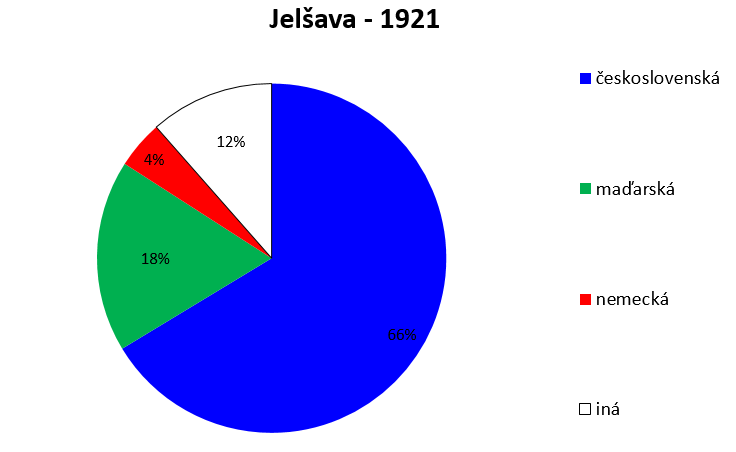 národnostné zloženie